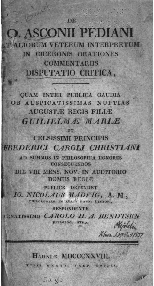 Forsiden af J. N. Madvigs disputats